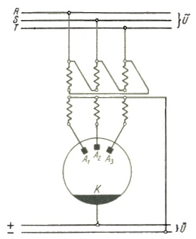 Schaltskizze eines Quecksilberdampfgleichrichters mit drei Anoden